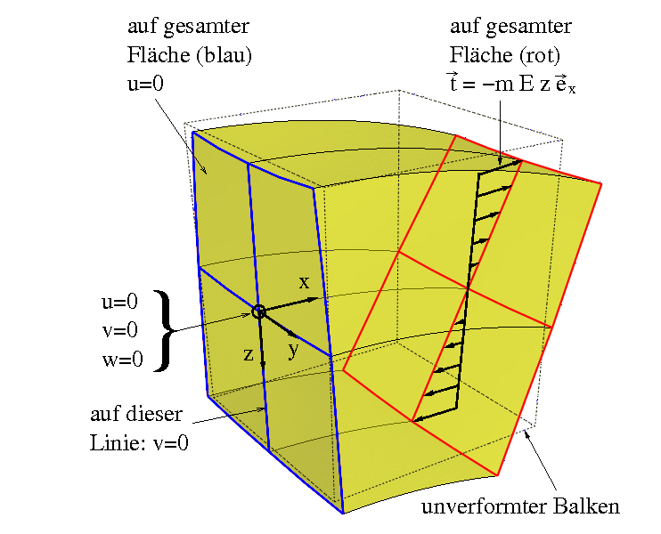 Randbedingungen bei der Biegung des geraden Balkens (gestrichelt). Die Verformung des Balkens (beige) ist fünffach überhöht dargestellt. Der Spannungsvektor t → {\displaystyle {\vec {t } hat die Dimension Kraft pro Fläche, E {\displaystyle E} ist der Elastizitätsmodul